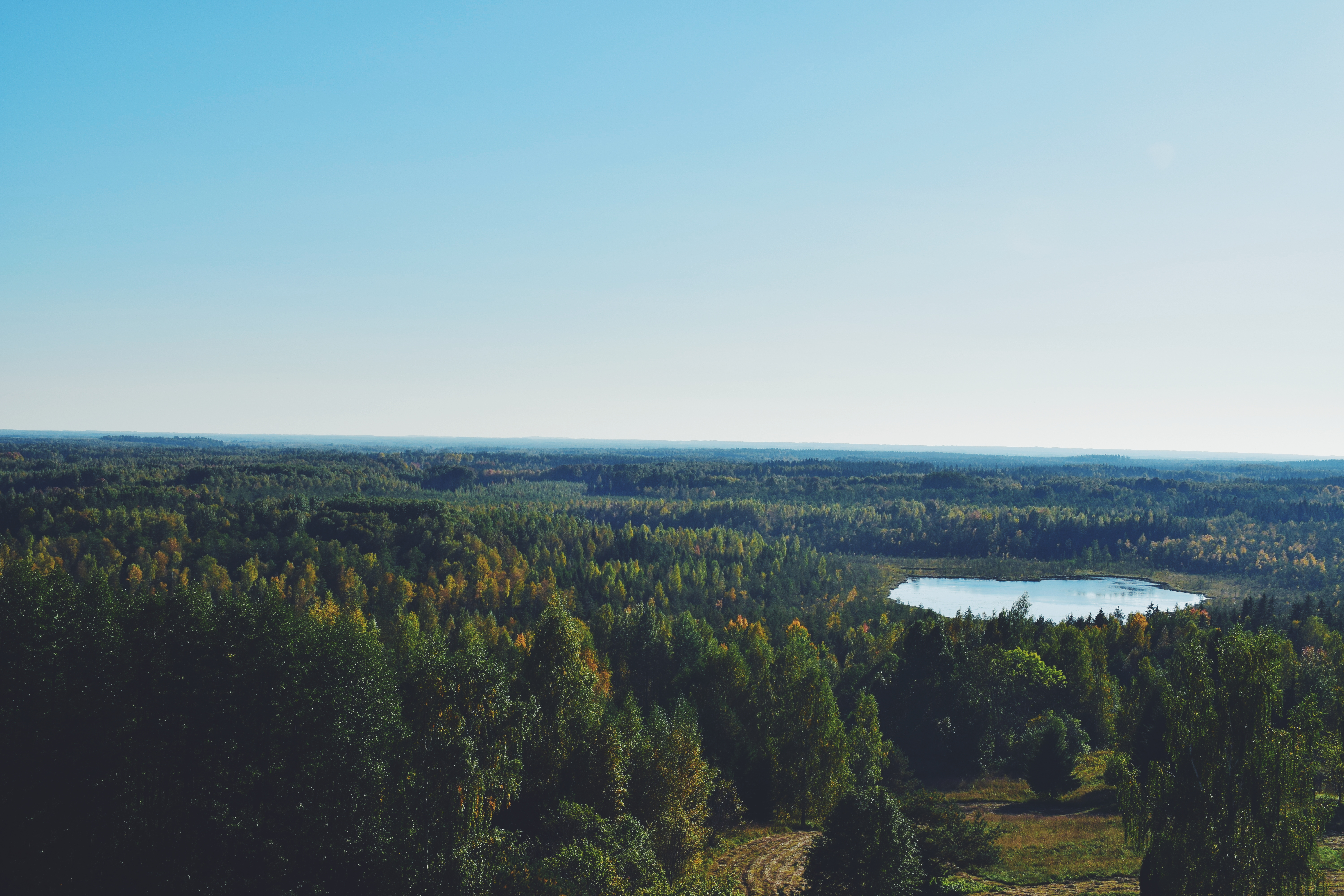 Numernes vaļņa dabas parks